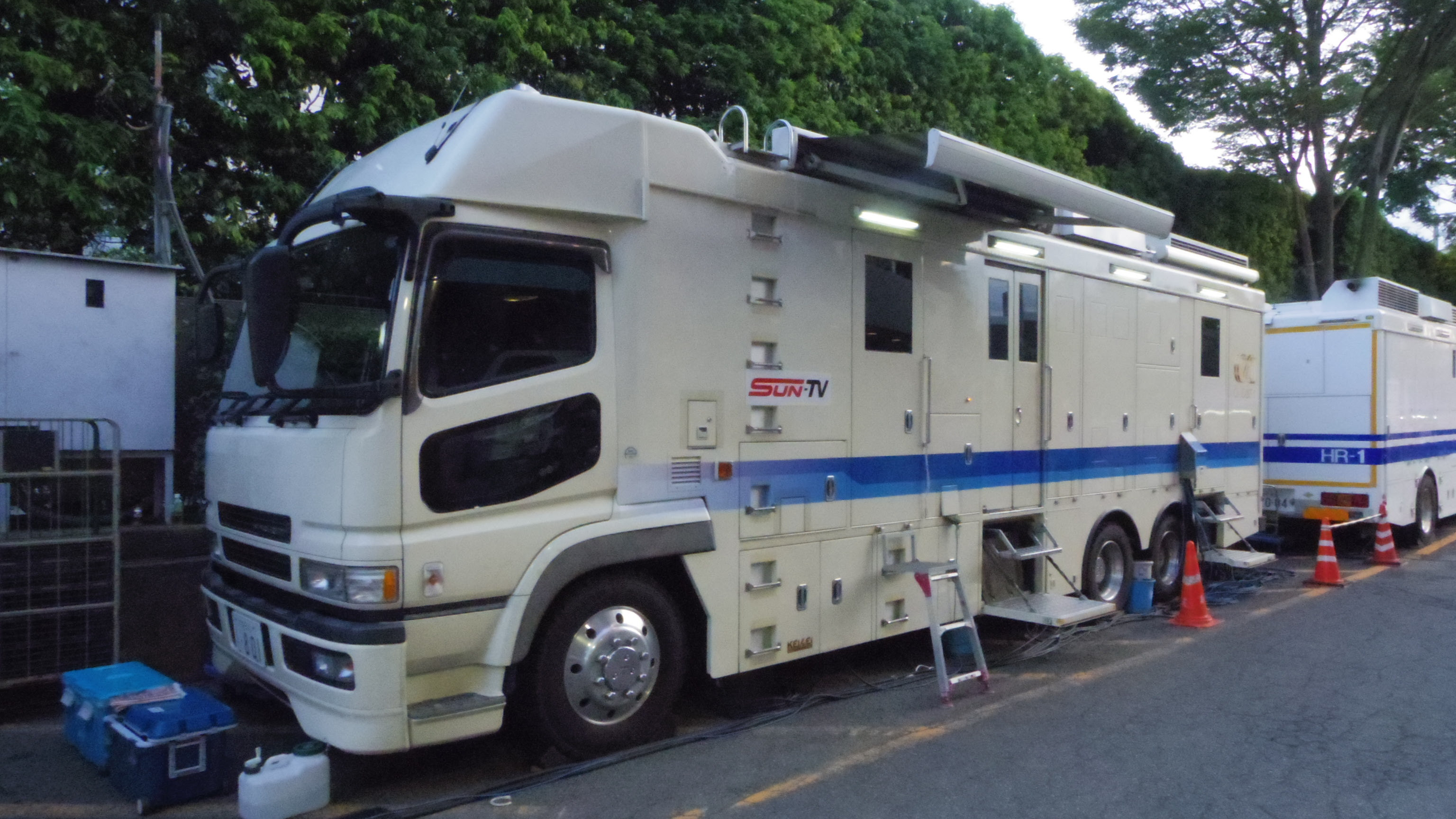 サンテレビ（兵庫県神戸市）の中継車。この日、神宮球場で行われた「ヤクルト×阪神」戦の中継のために来ていた。